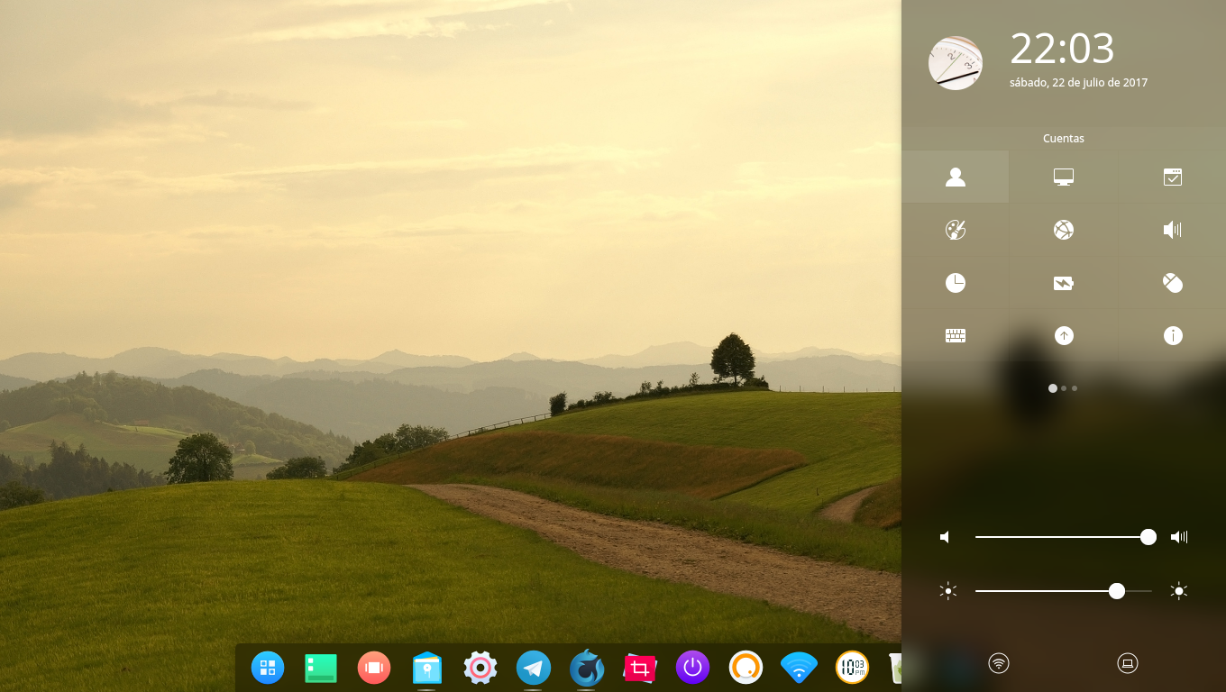 Deepin 15.4 con un fondo de pantalla de campo.